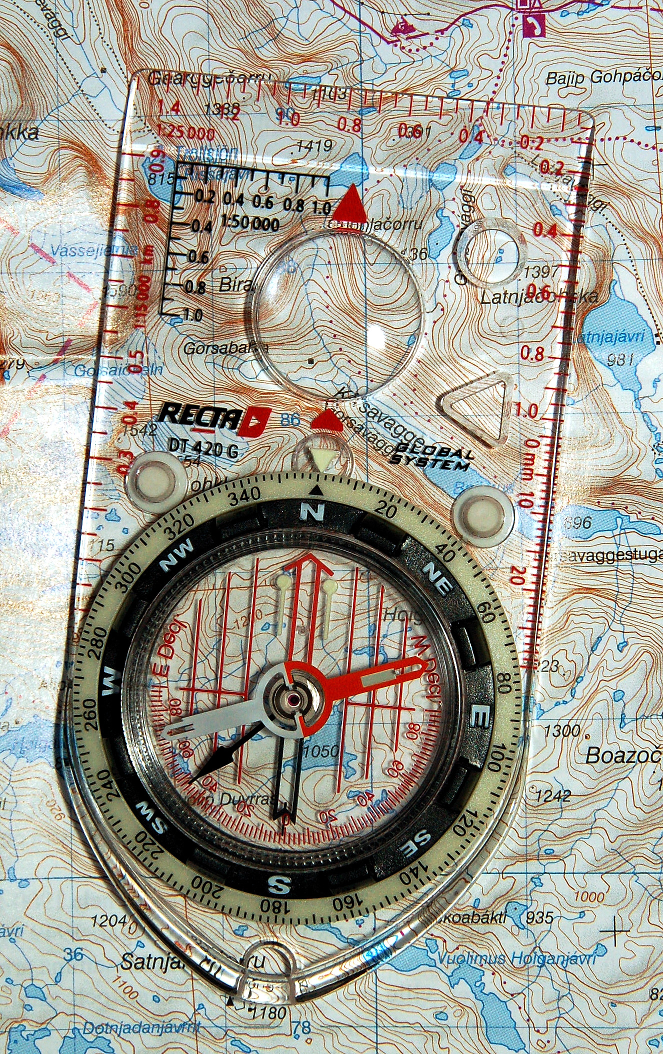 Kartenkompass (Recta)